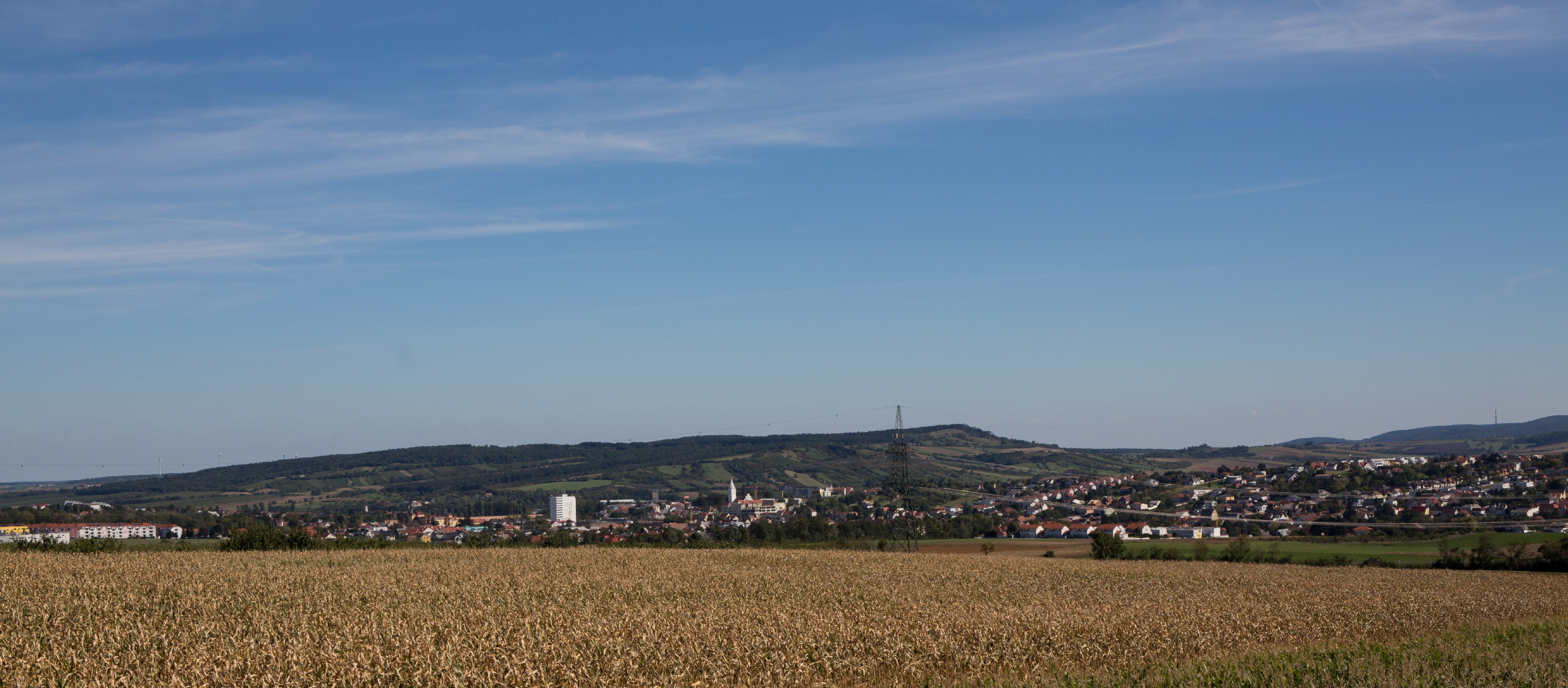 Mattersburg im Burgenland, Austria